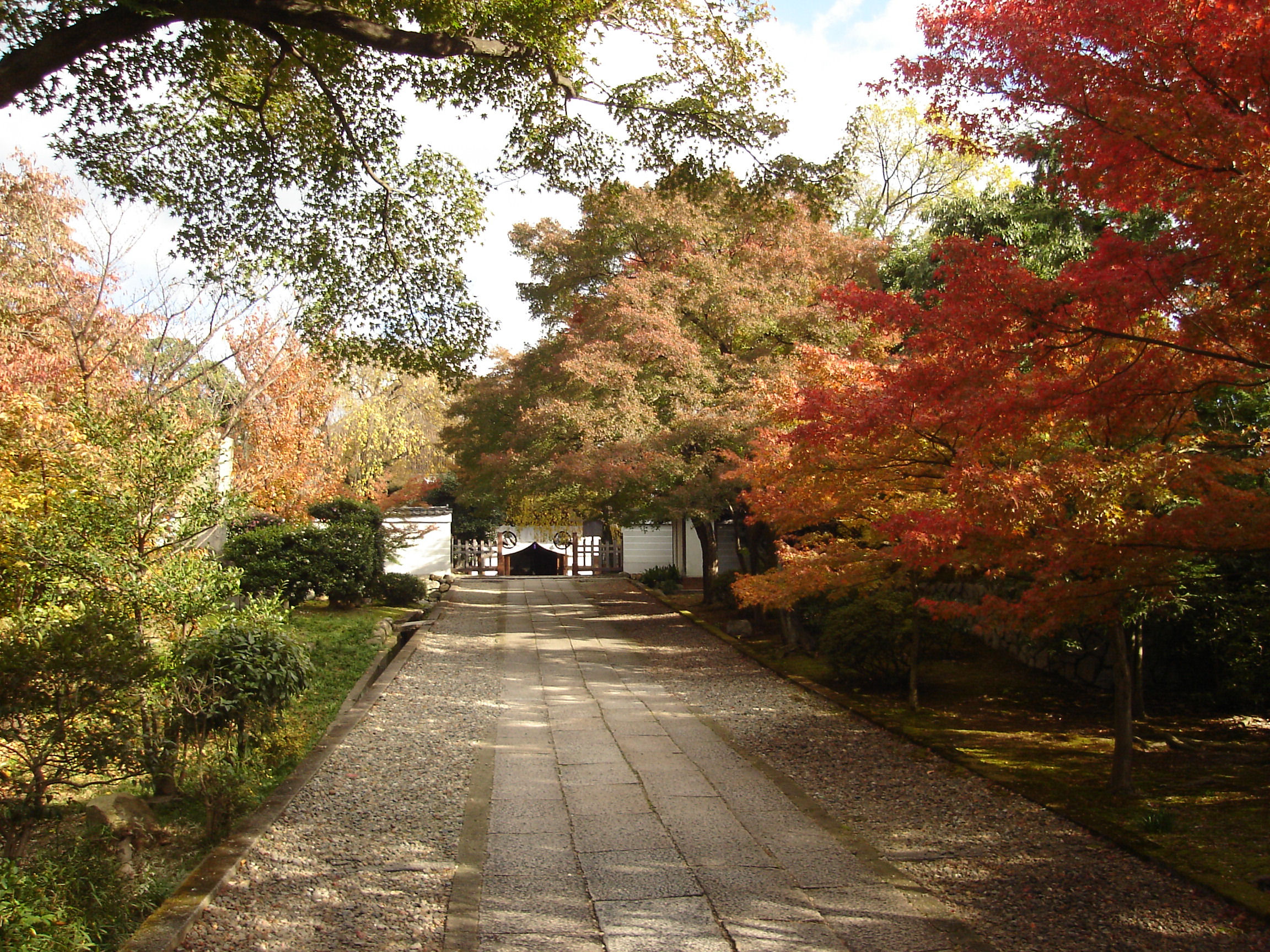 Yogenin , Kyoto, Japan